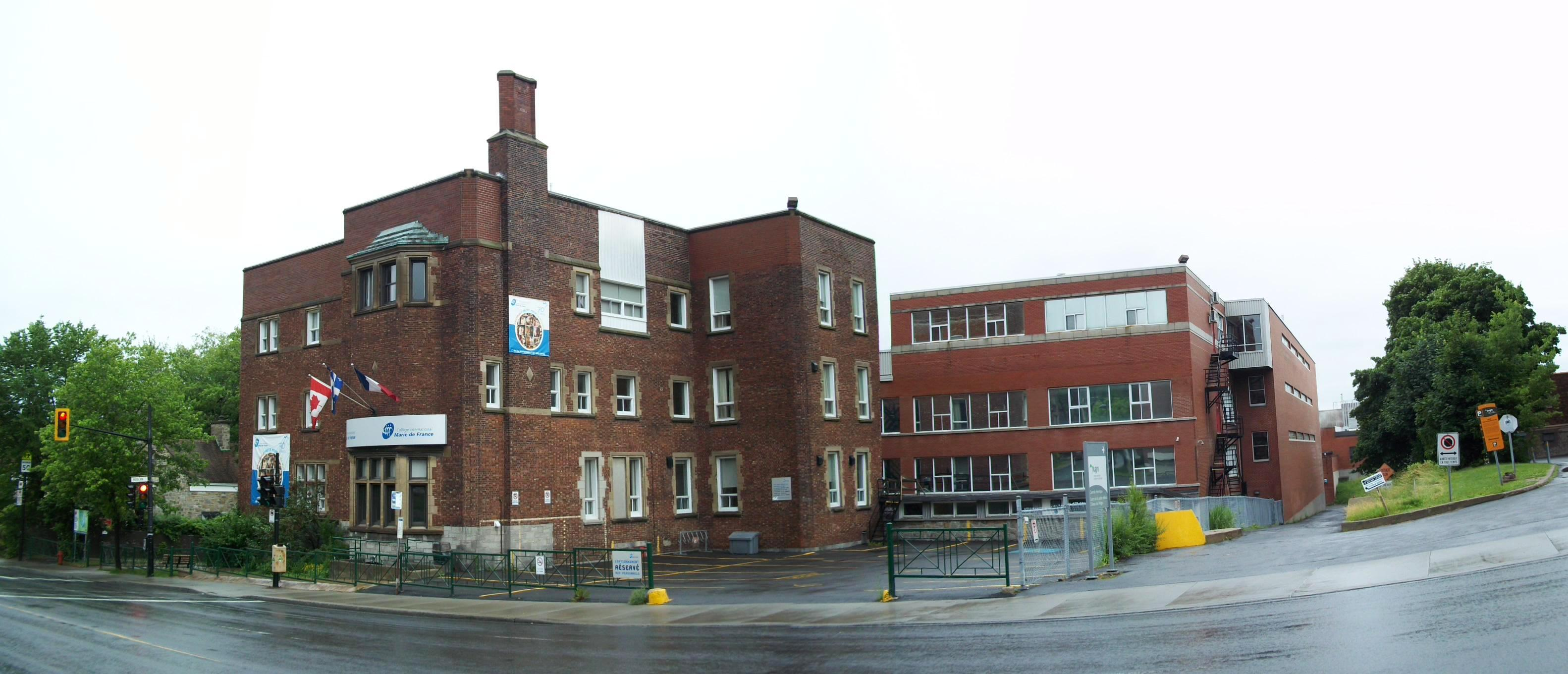 Collège international Marie de France, 4635, chemin Queen-Mary, Montréal. info